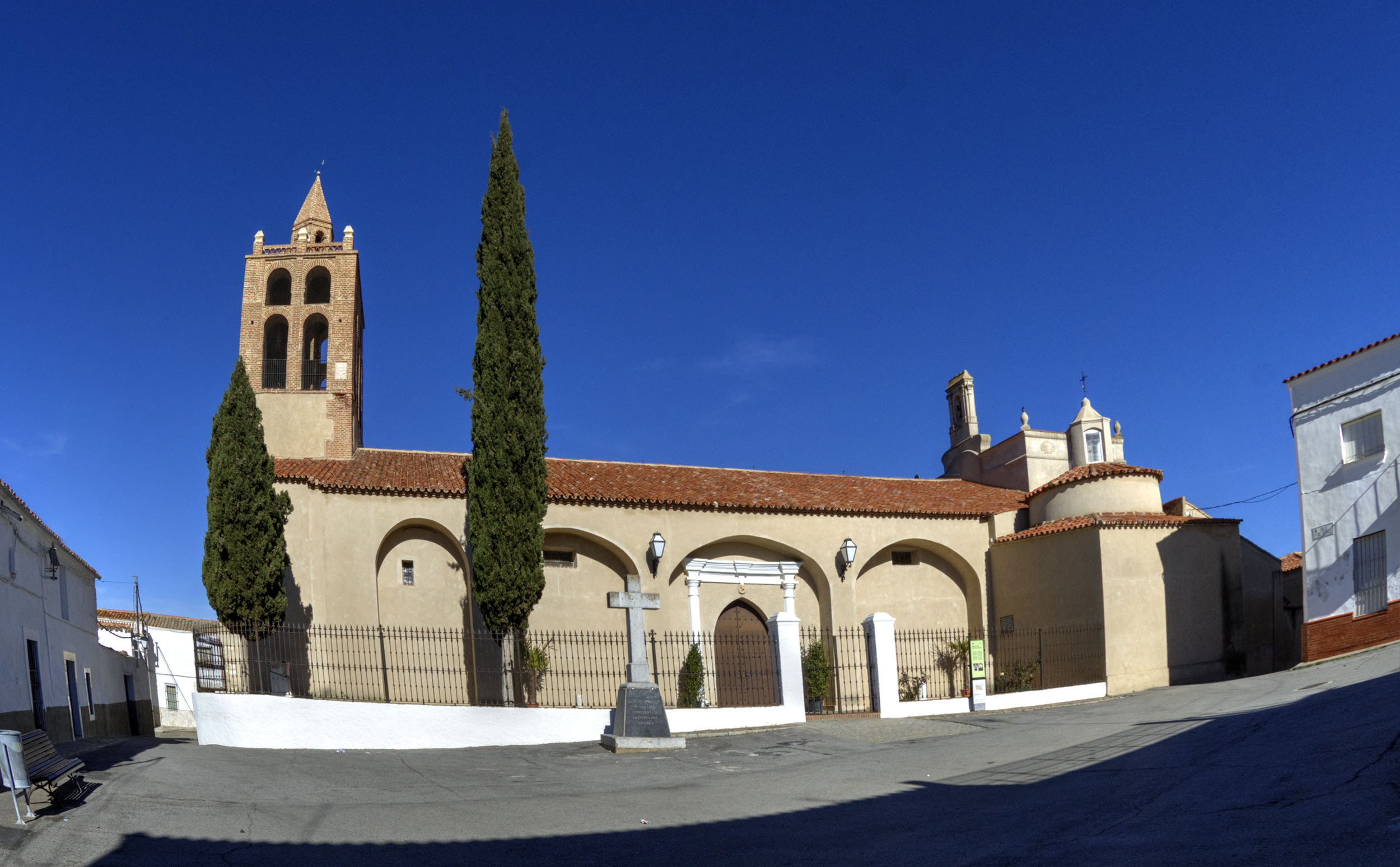 Iglesia parroquial en la Plaza de España de Valencia de las Torres, Badajoz.